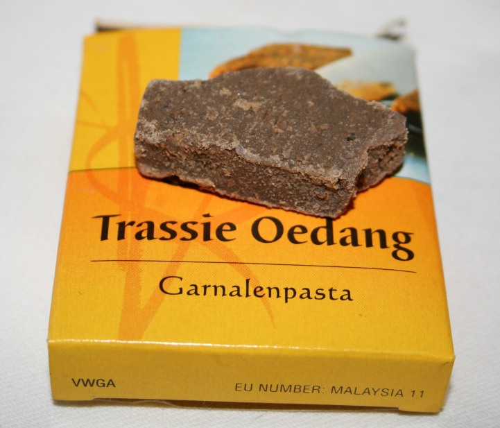 Trassie oedang, eigen werk.